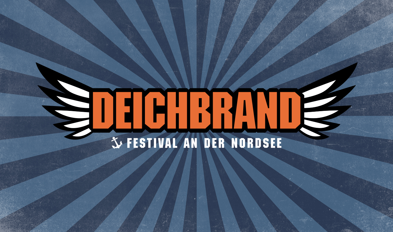 DEICHBRAND Festival an der Nordsee